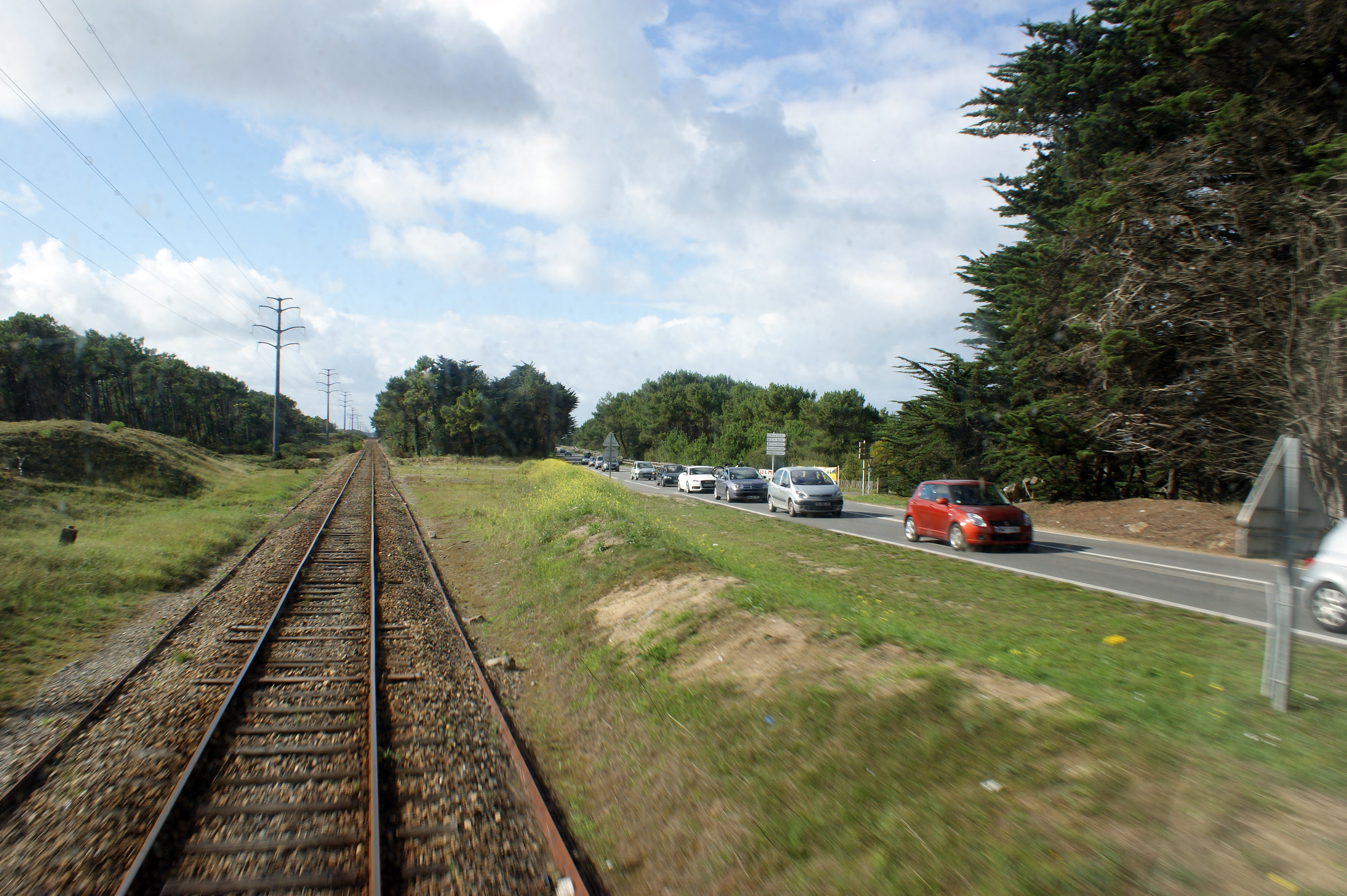 La ligne d'Auray à Quiberon sur la commune de Plouharnel, entrée dans la forêt en longeant la D 768